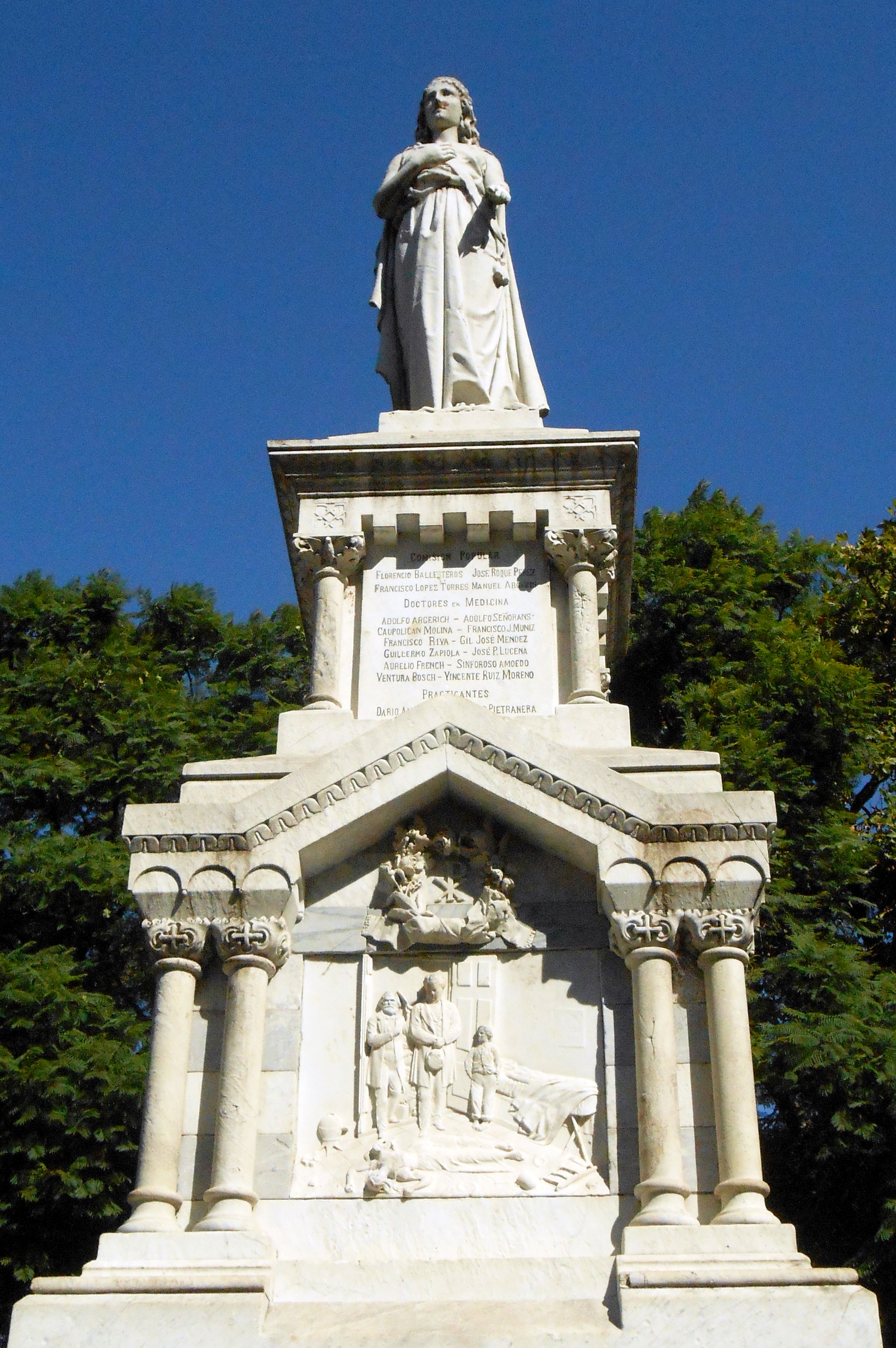 Parque Florentino Ameghino, Buenos Aires, Argentina. Monumento erigido en 1873 a los caídos por la fiebre amarilla de 1871. Obra de Manuel Ferrari.